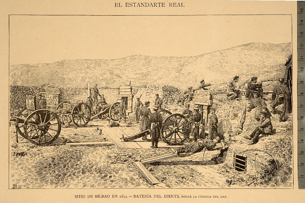 Bilboko setioa 1874an: Diente bateria, gas fabrikaren gainean.